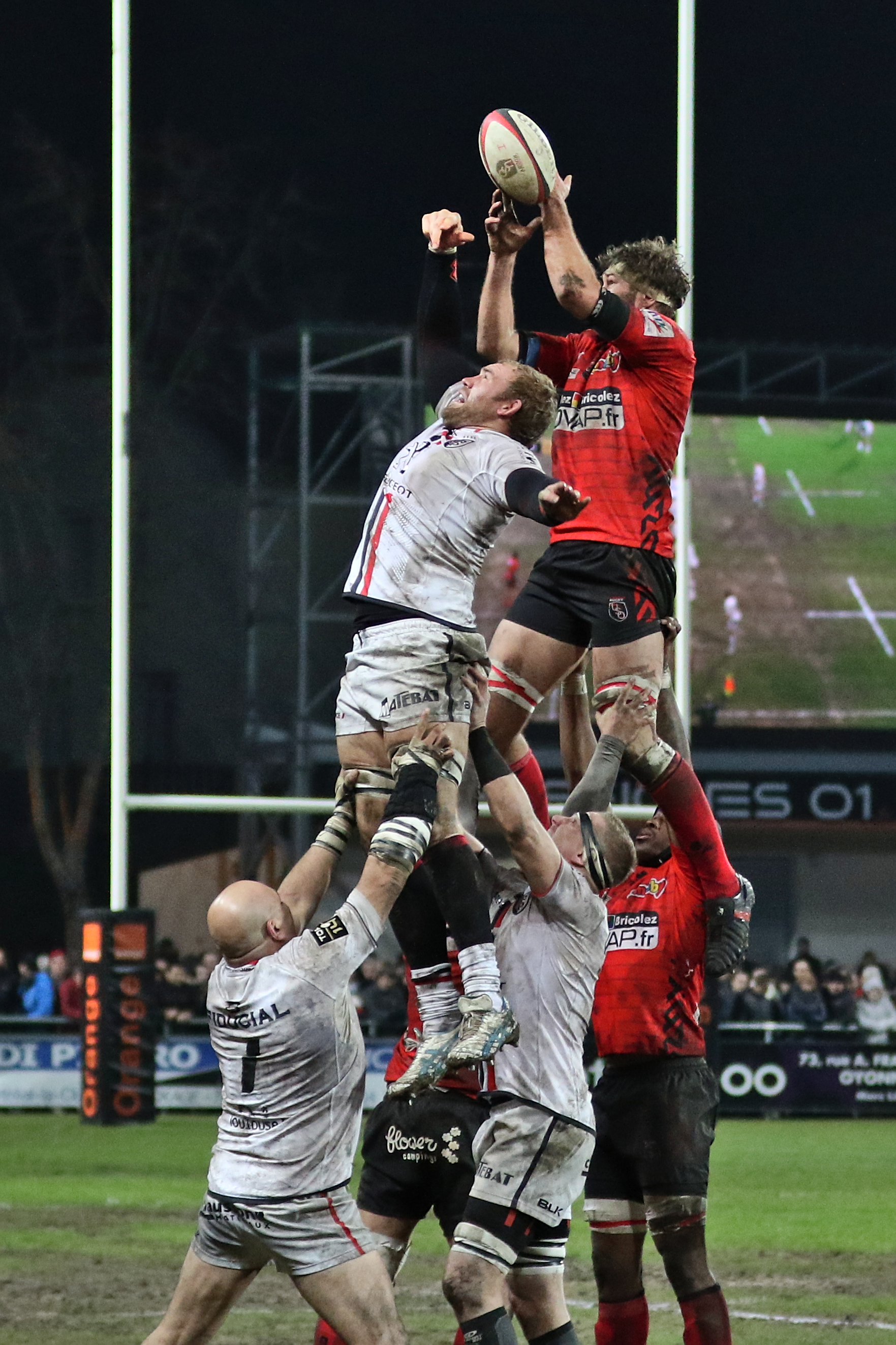 USO-ST - 20150306 - Saut en touche